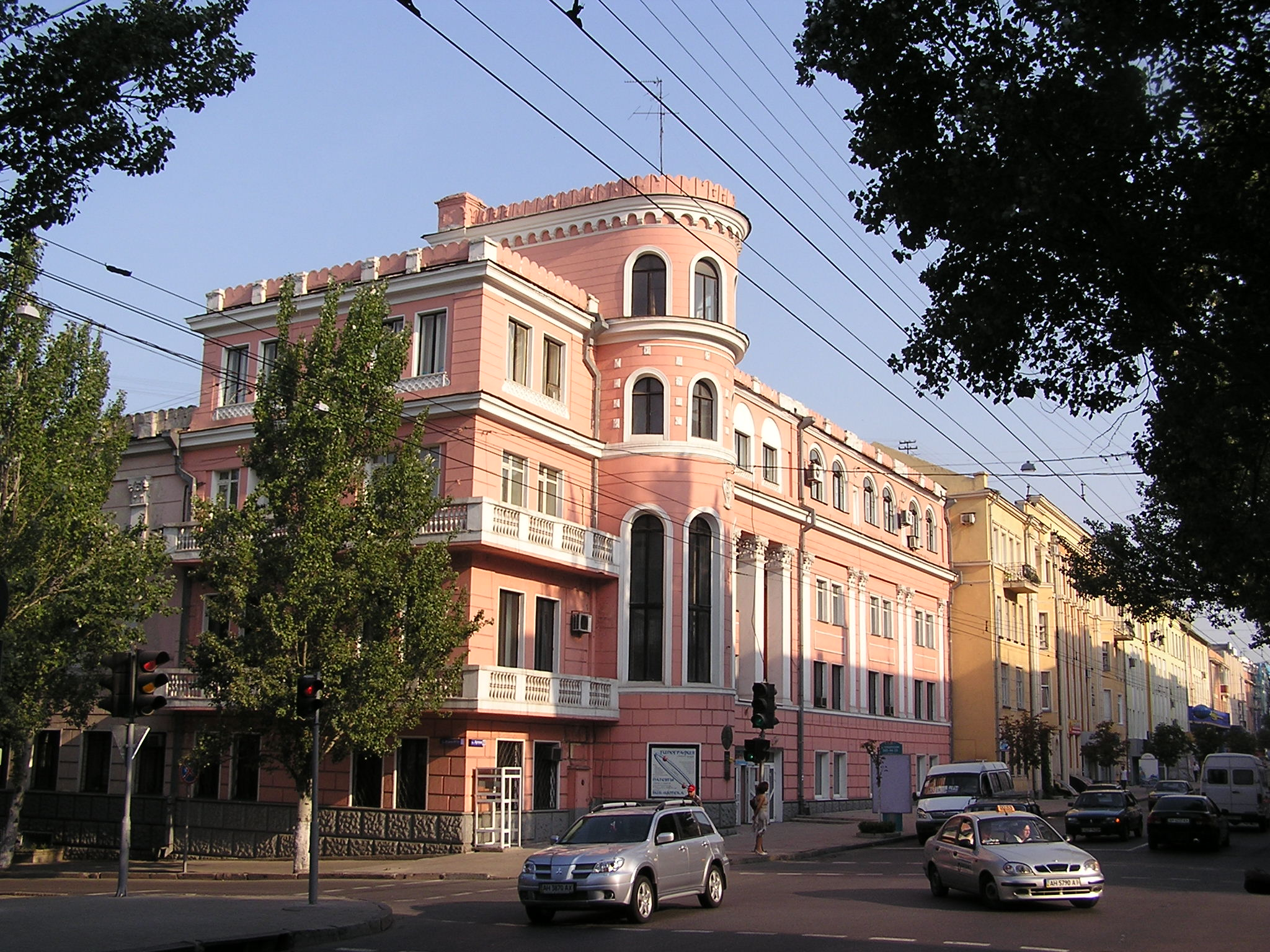 Донецк. Фасад дома по Артёма, 60